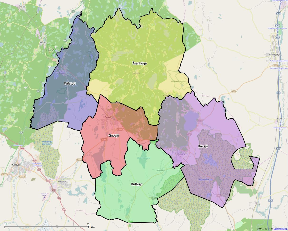 Distriktsindelningen i Gnosjö kommun